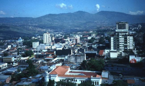 San Cristóbal, Táchira, Venezuela, foto del centro de la ciudad desde un edificio cercano al placio de Los Leones (edificio blanco en la parte inferior), tomada en 1995